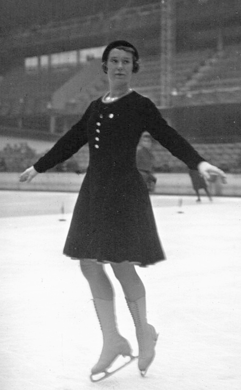 Palais des Sports : Championnats d'Europe : Melle de Landbeck : [photographie de presse] / Agence Meurisse